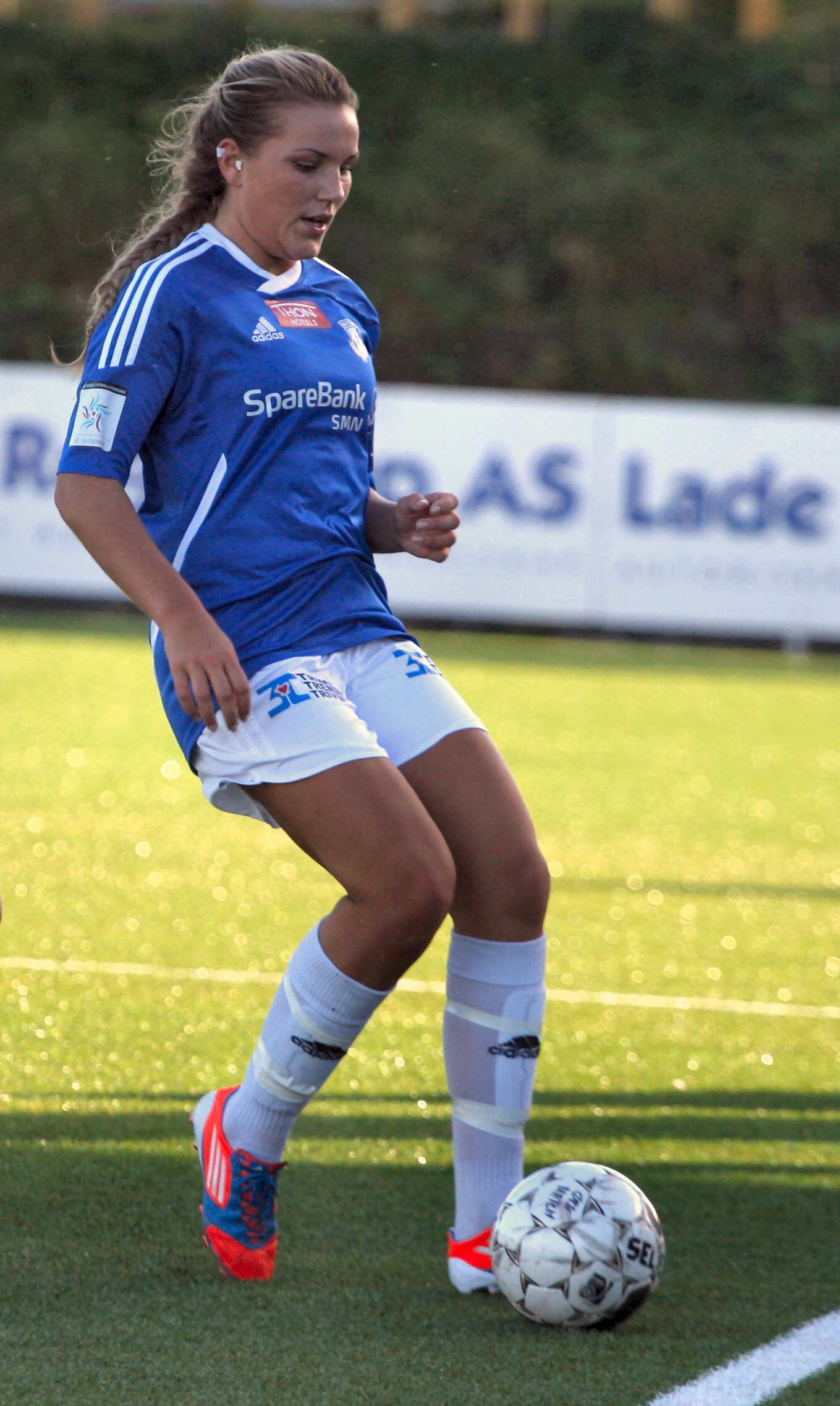 Fotballspilleren Rikke Storrø